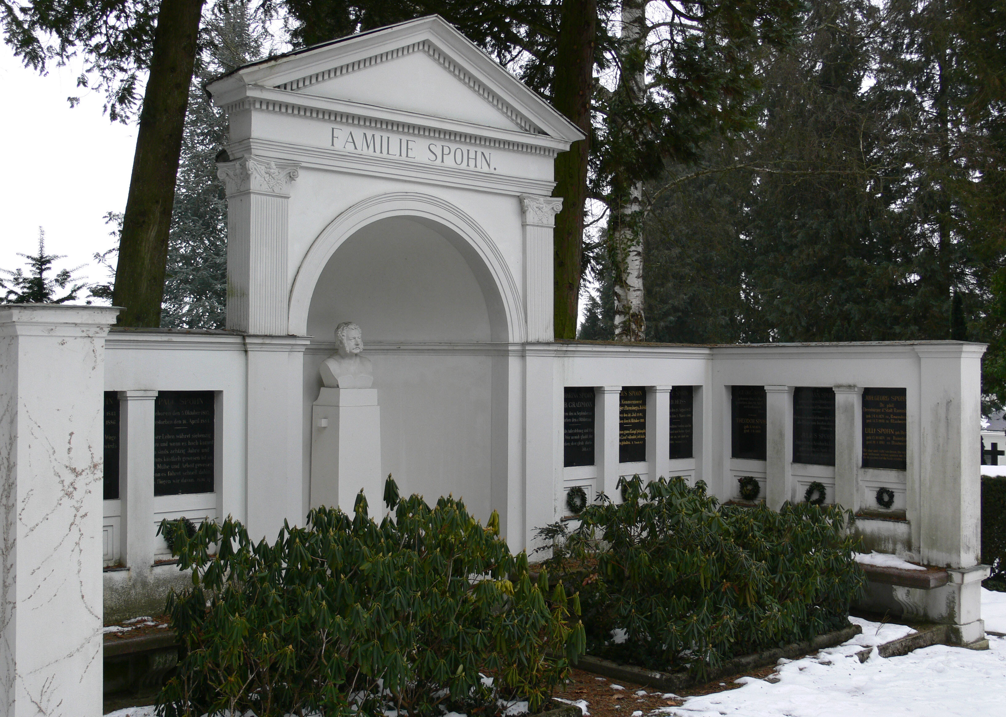 Ravensburg, Hauptfriedhof, Familiengrab der Industriellenfamilie Spohn, entworfen vom Stuttgarter Architekten Reinhardt